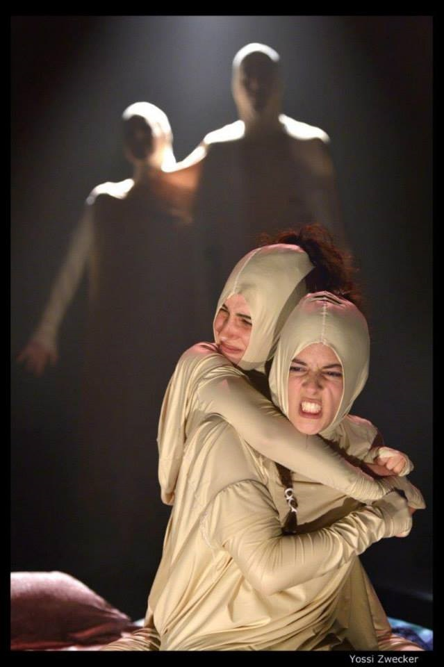 הערפד, הגנב, הזונה והירח